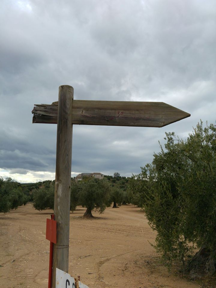 Señal de La Iglesia, fortificación en la Ruta arqueológica de los Torreones.